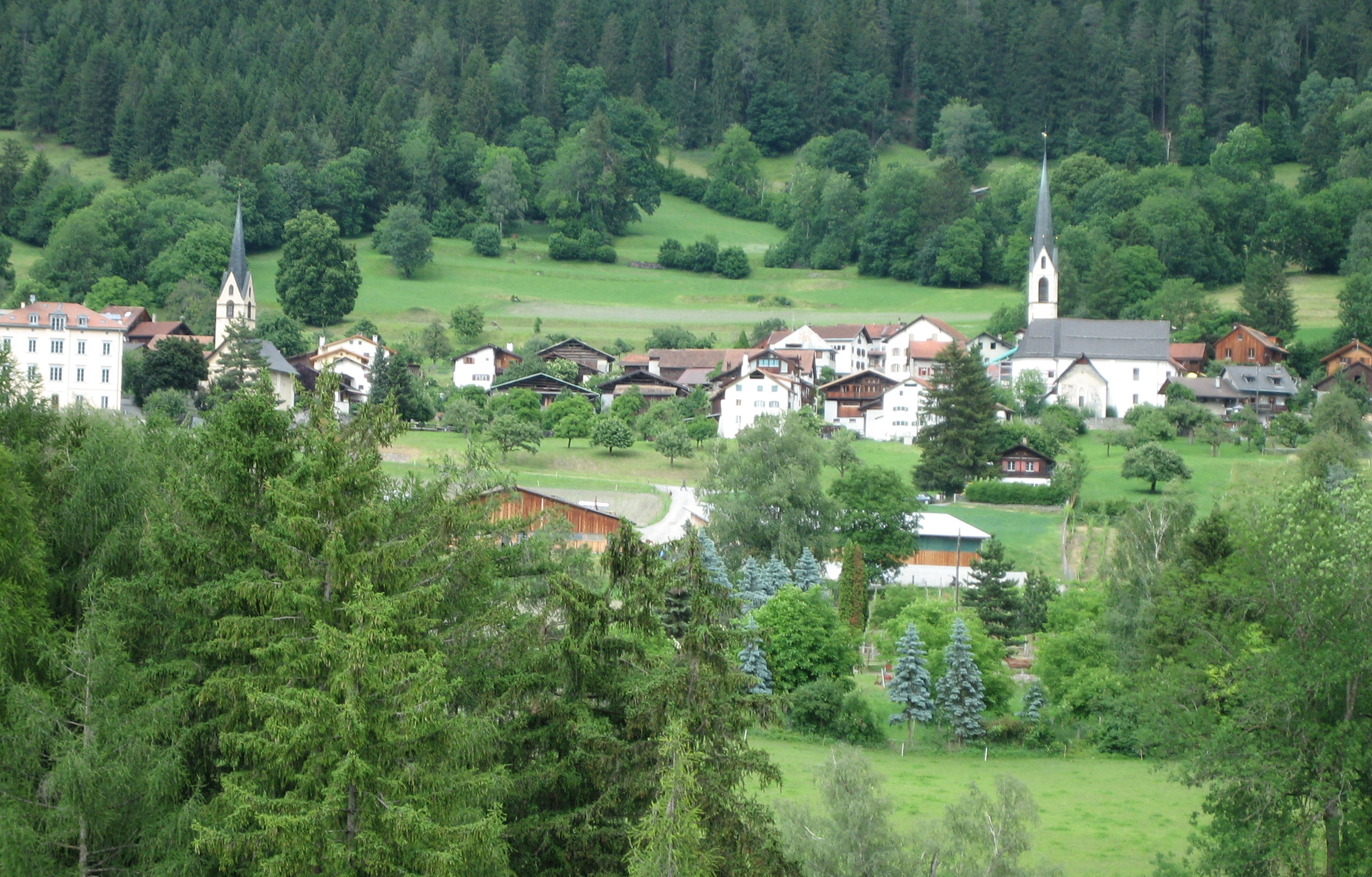 {Almens von Süden